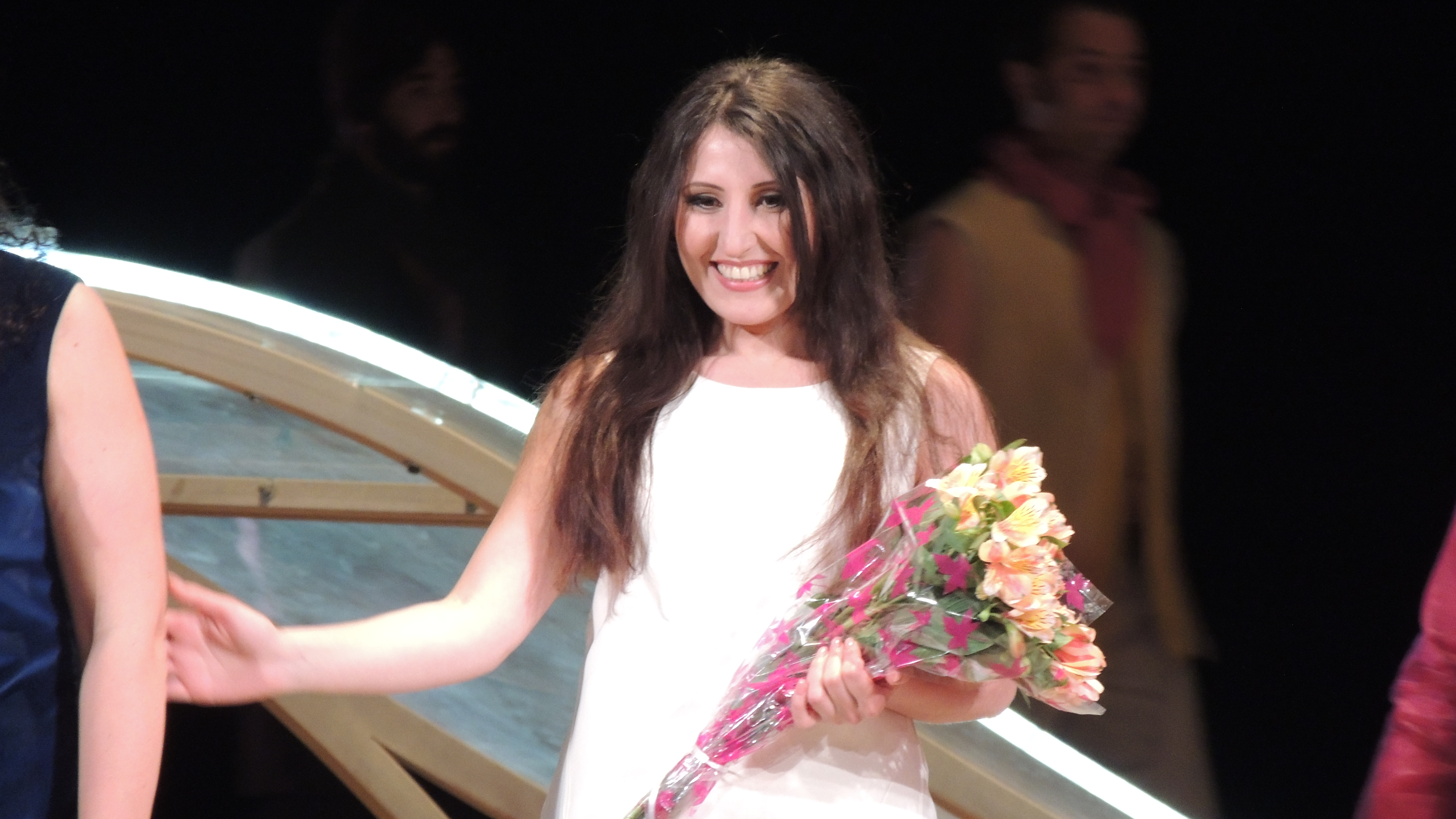 Սոֆյա Սայադյան «Անուշ» օպերայի բեմադրության ժամանակ